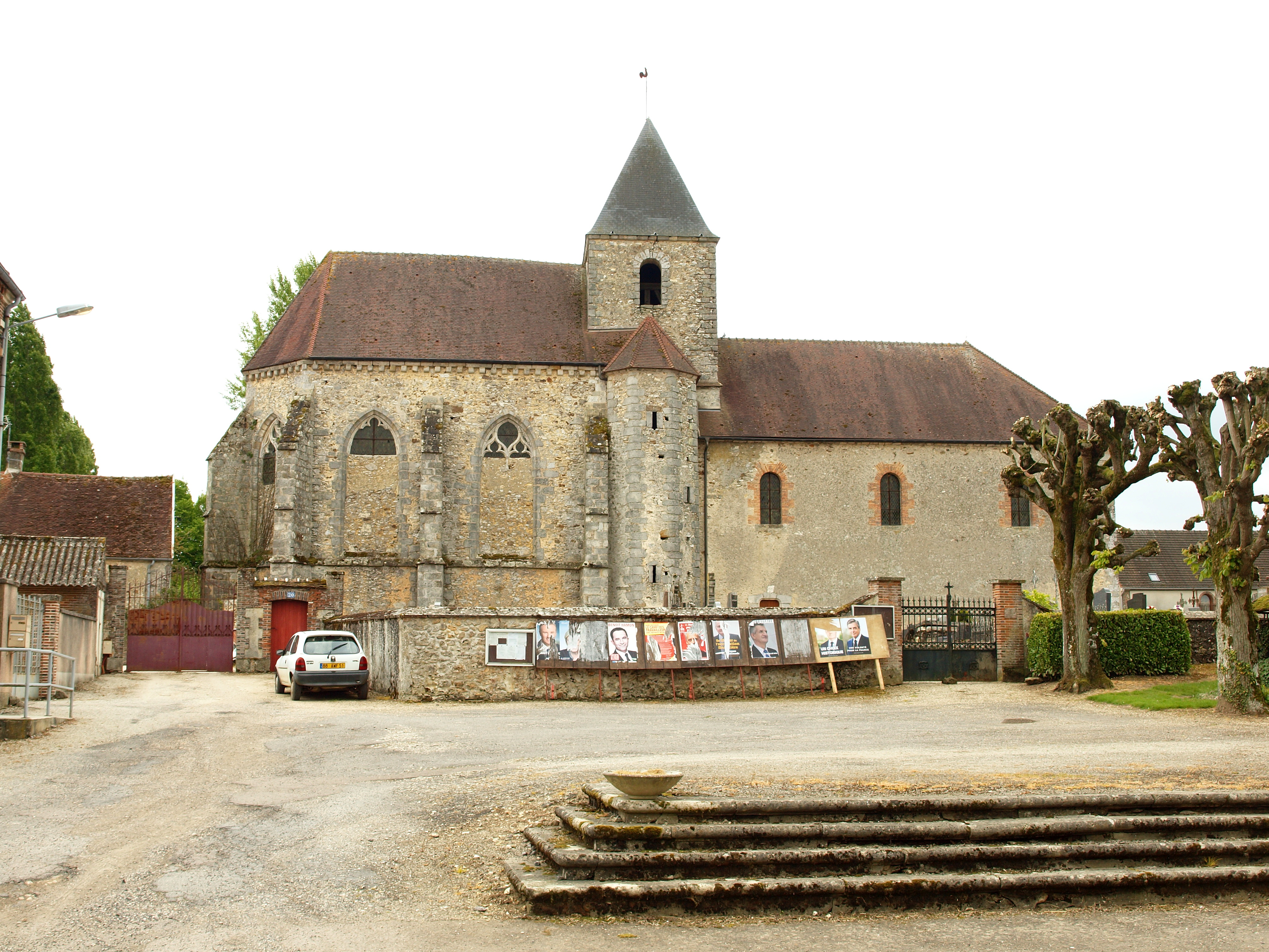 Les Essarts-lès-Sézanne (Marne, France)